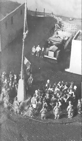 בתמונה רואים את מחנה הריכוז "ברגן בלזן"